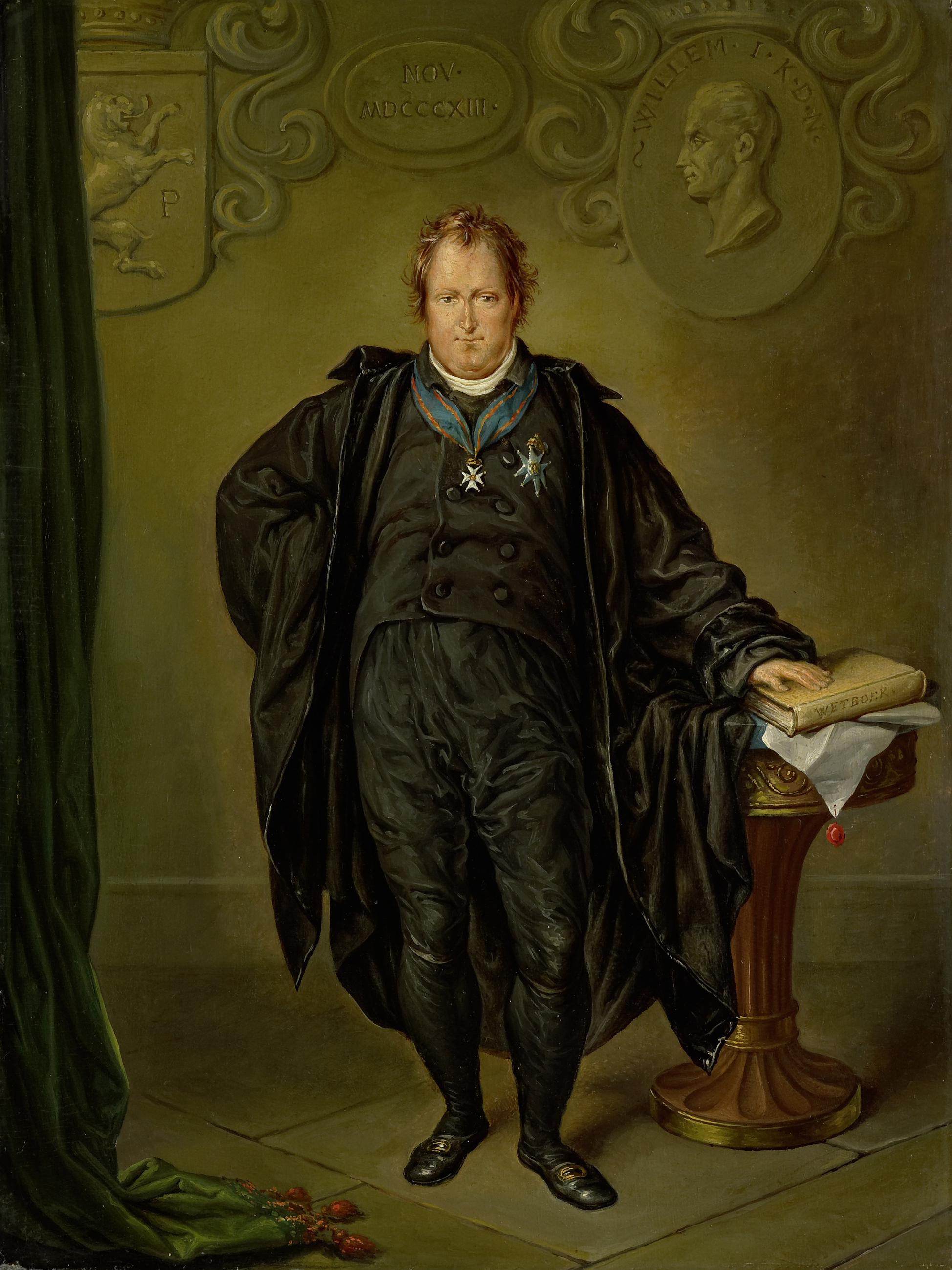 Portret van Johan Melchior Kemper, rechtsgeleerde en staatsman. Staande, ten voeten uit bij een tafeltje, met zijn linkerhand op een wetboek. Op de achtermuur plaketten van koning Willem I en de Nederlandse Leeuw. Op zijn borst draagt Kemper de versierselen van de benoeming tot Commandeur in de Orde van de Nederlandse Leeuw, verleend op 18 november 1815 (in tegenstelling tot de datum november 1813 op het schilderij).